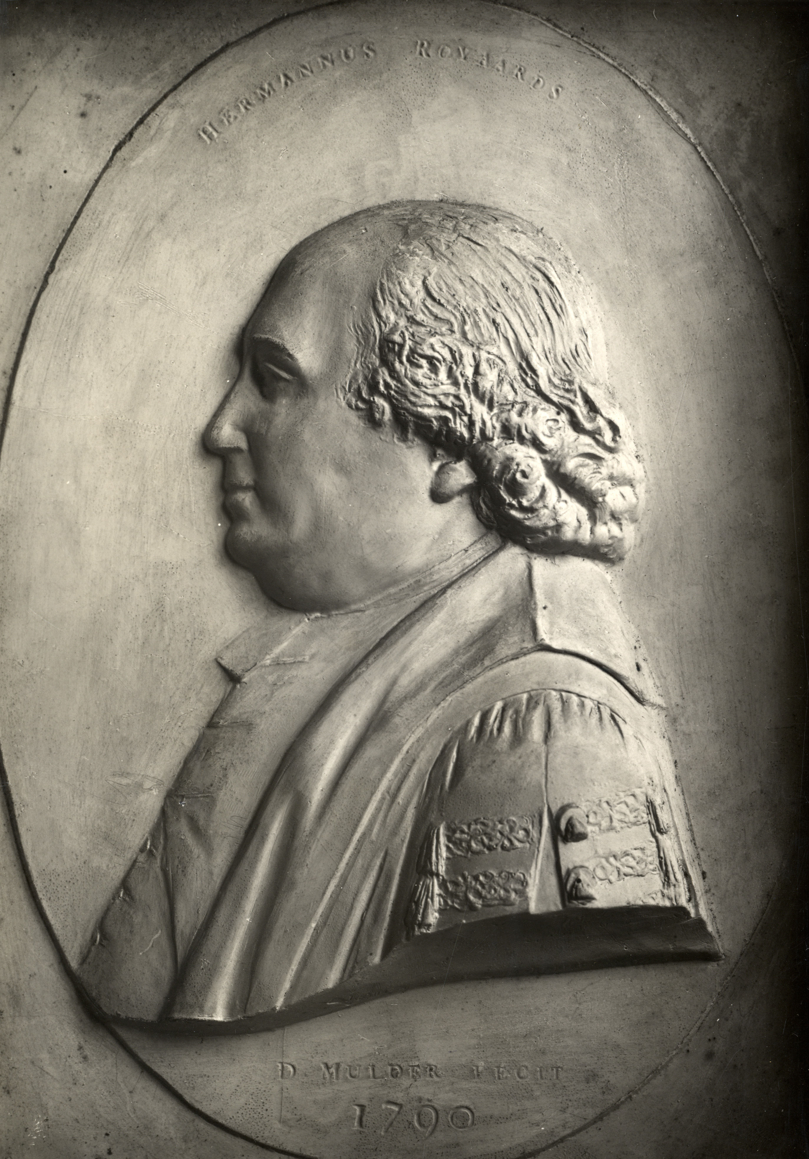 Portret van Hermanus Royaards, geboren Zaltbommel 7 april 1753, hoogleraar in de theologie aan de Utrechtse hogeschool (1788-1823), overleden Utrecht 15 januari 1825. Borstbeeld links, in profiel, in toga. Medaillon in gipsreliëf, gemaakt door David Mulder in 1799. Het medaillon bevindt zich in de collectie van het Centraal Museum Utrecht.